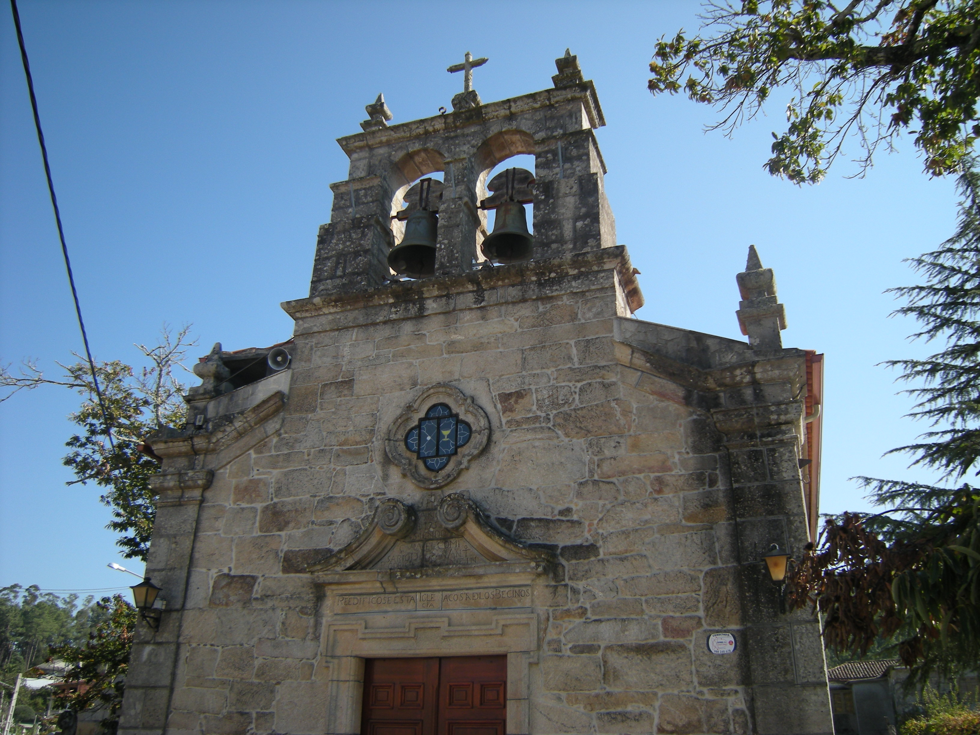 La primitiva iglesia fue construida en el siglo XII y perteneció a un desaparecido monasterio cluniacense.